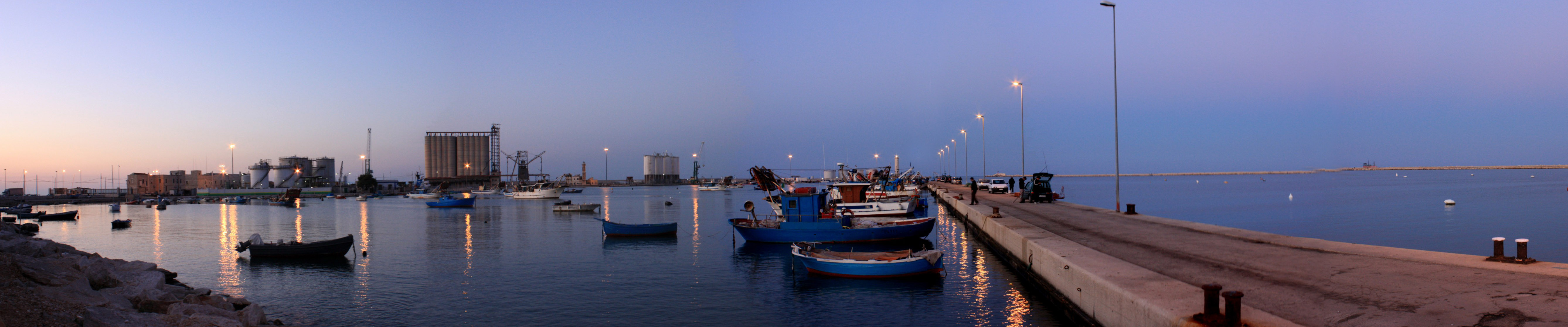 Panoramica del Porto di Barletta al tramonto